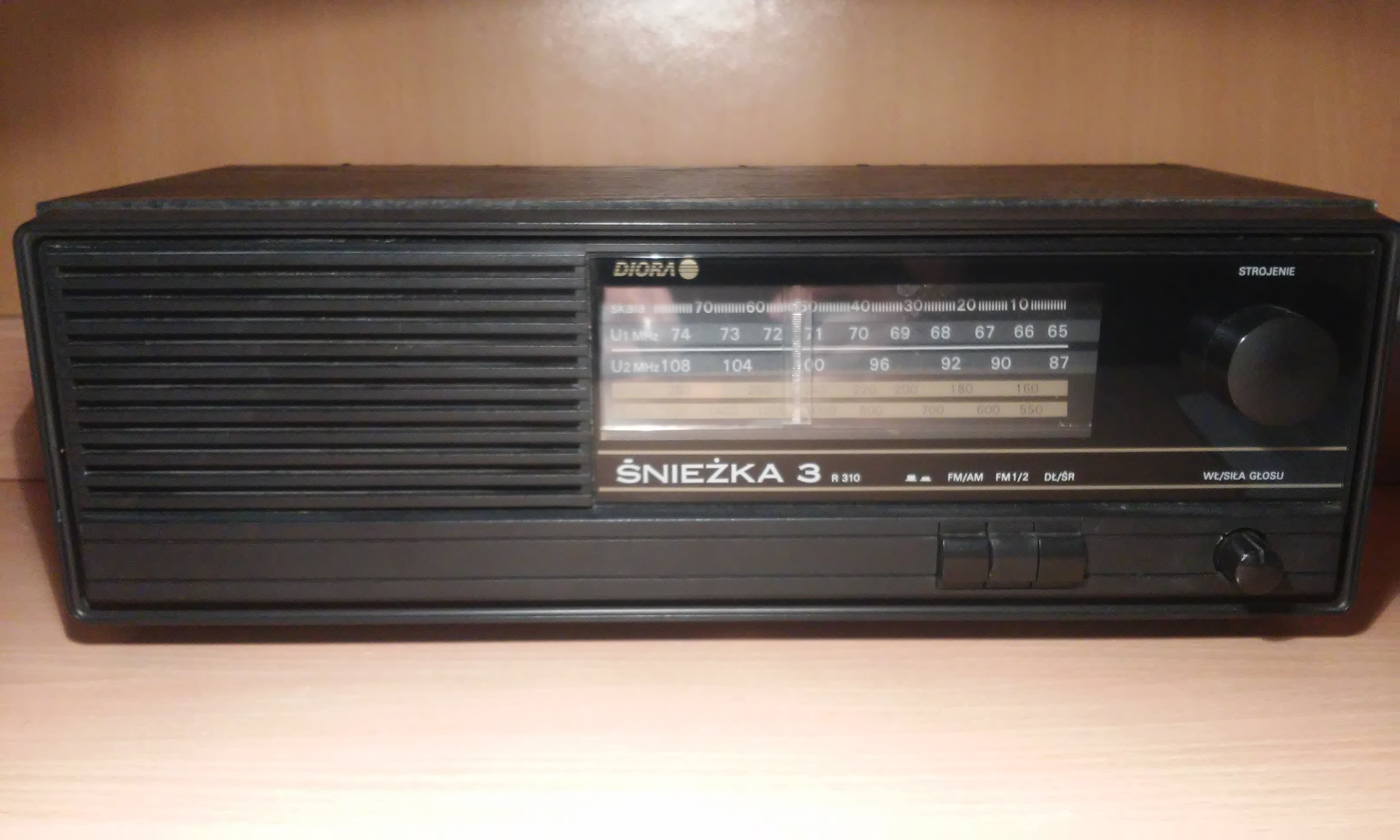 Śnieżka R310